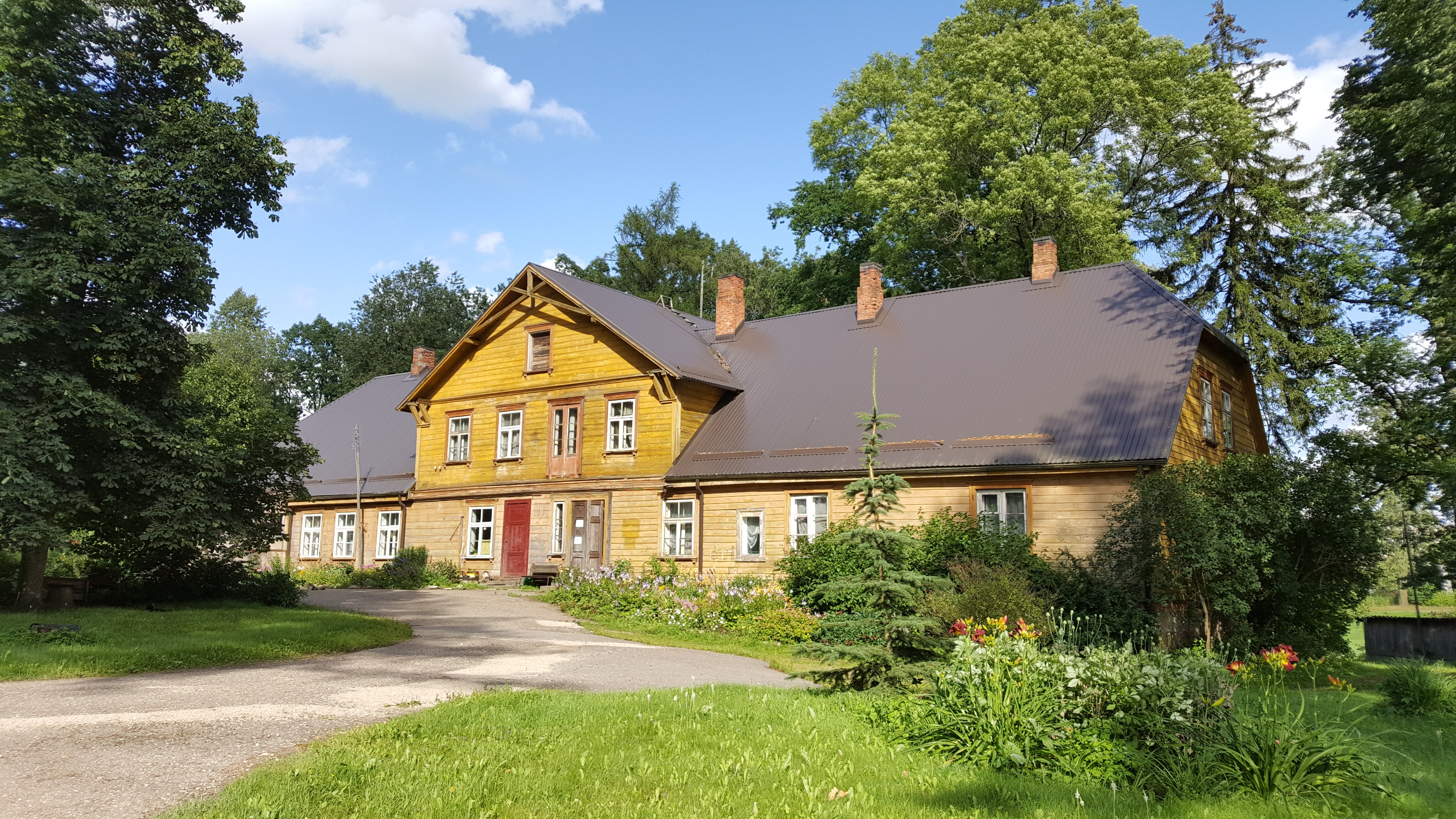 Plāņi mõisa peahoone 2017. aastal.